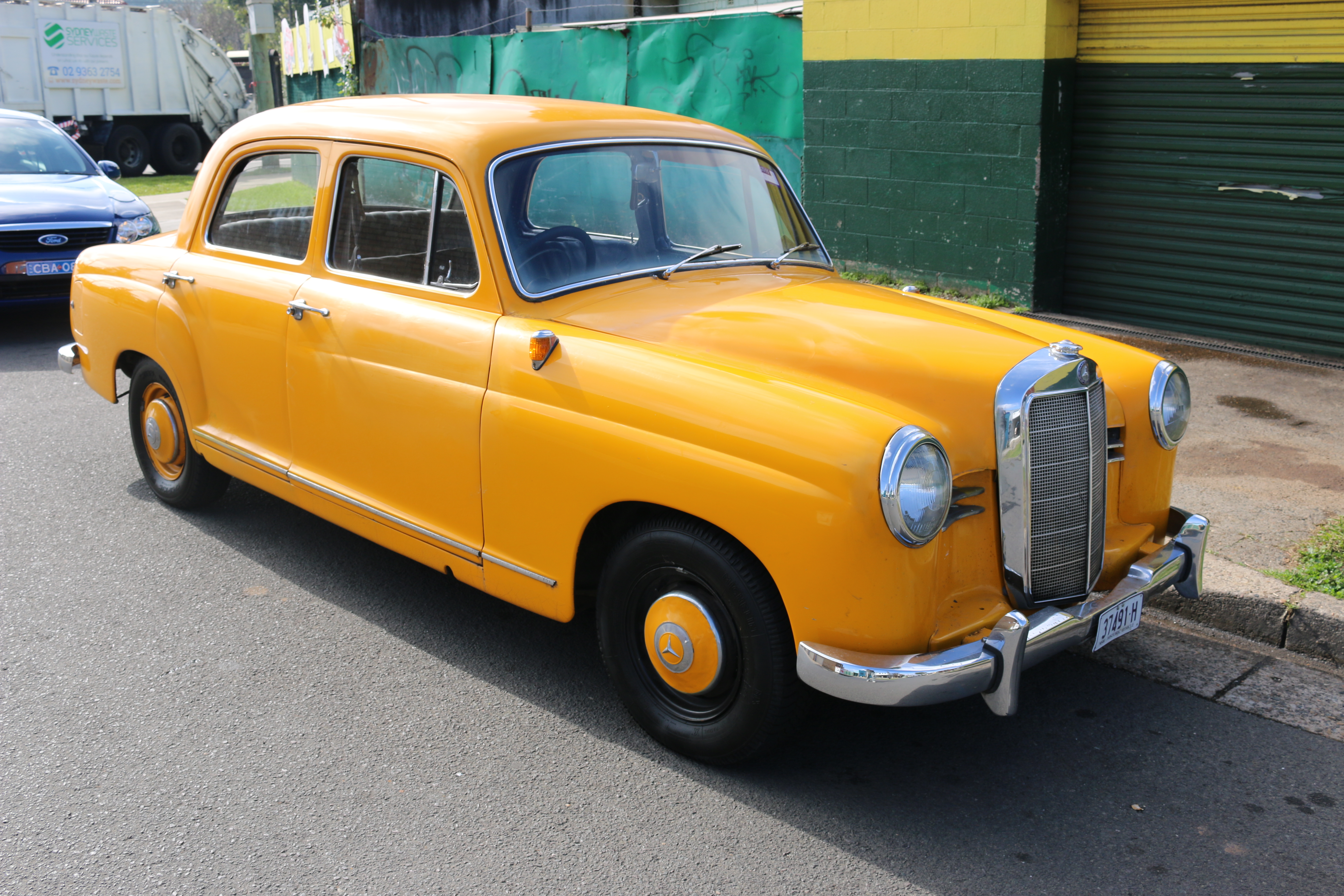 Mercedes Benz W120 180